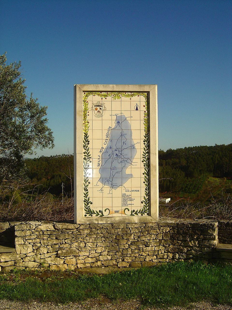 Nesta painel de azulejos à beira da estrada está representado o mapa da freguesia.